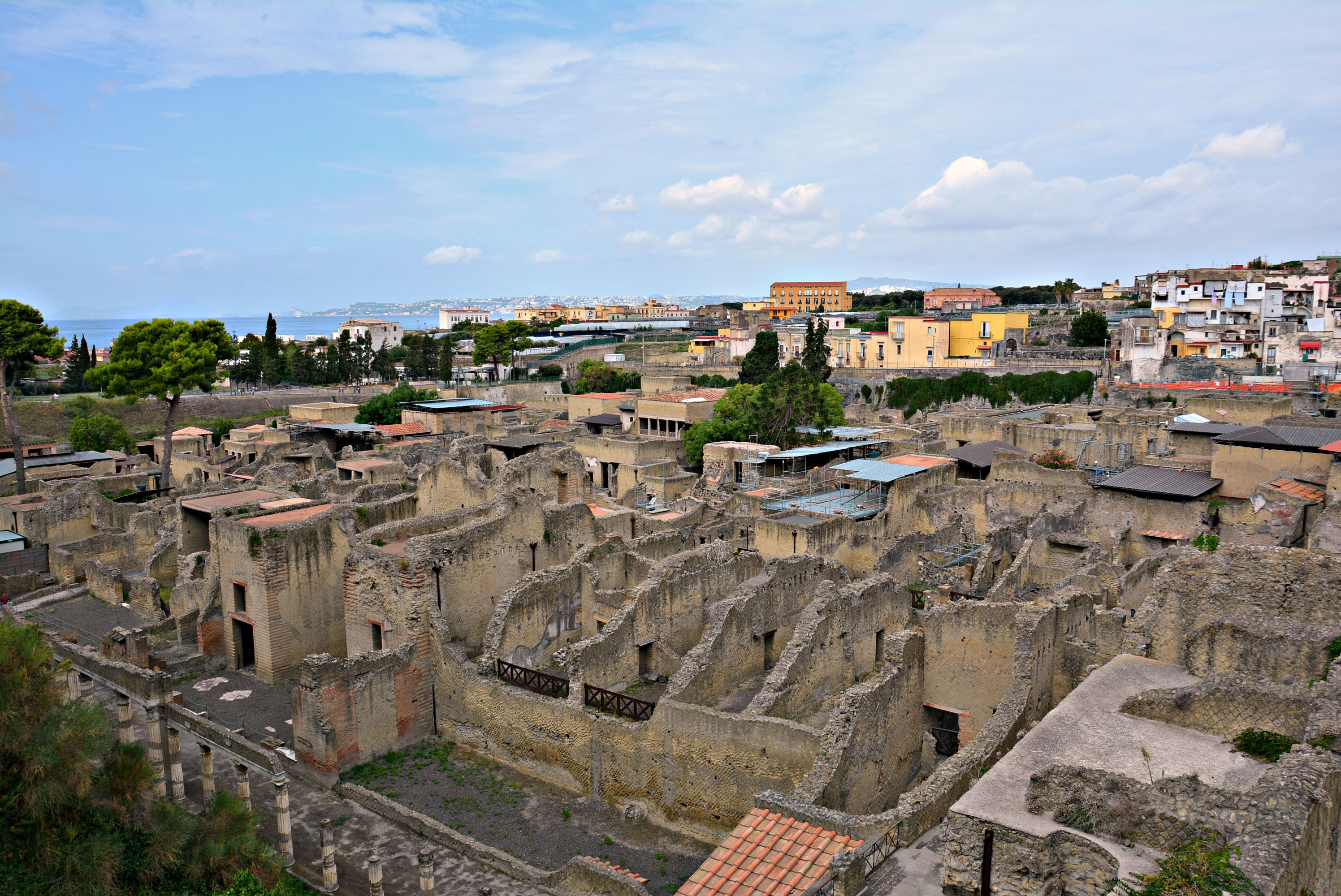 Cardo V - MIBAC This is a photo of a monument which is part of cultural heritage of Italy.